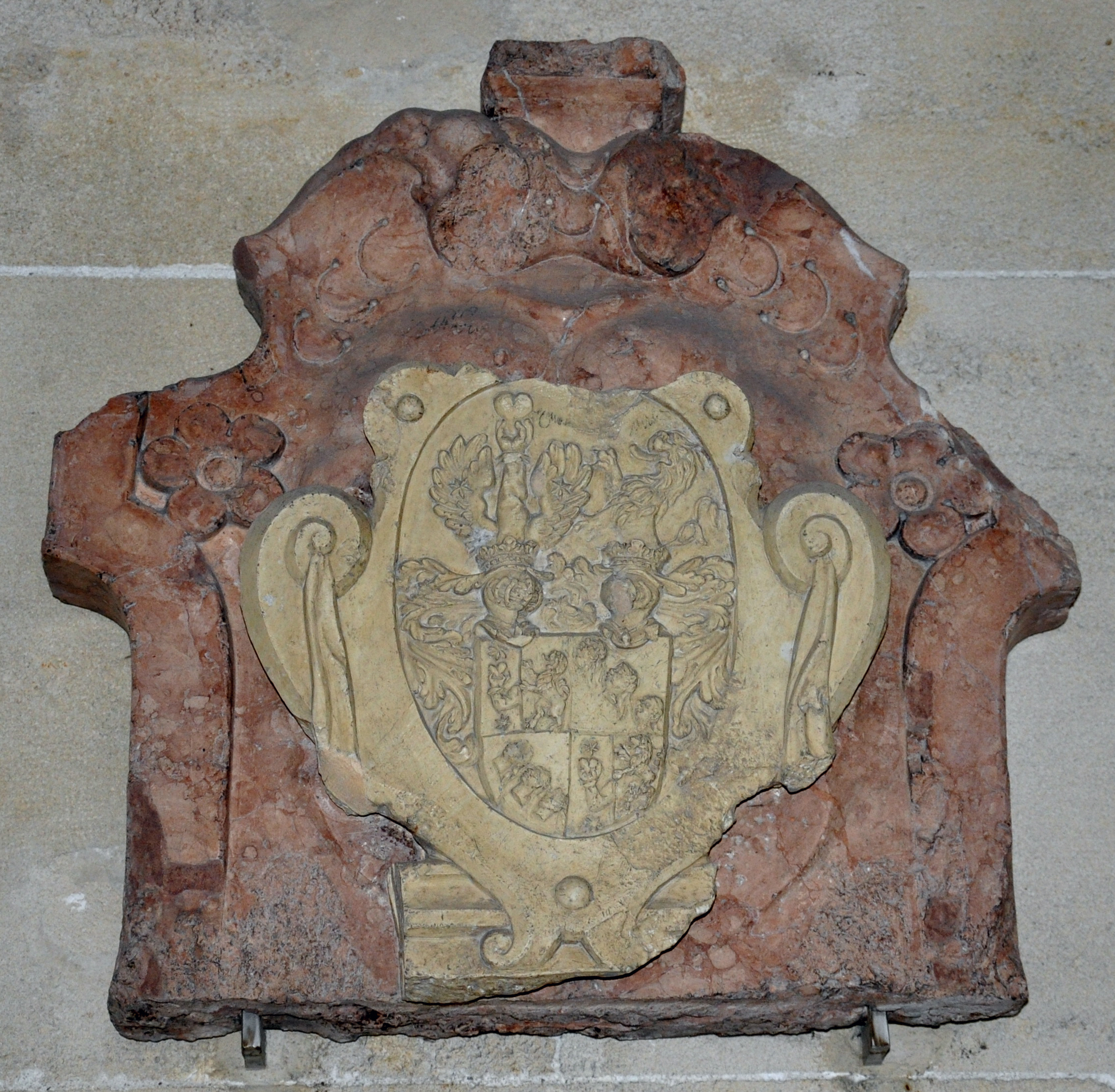 Wien, Minoritenkirche (neugotischer Arkadengang an der Südseite), Fragment mit Allianzwappen von Manincor, Blasonierung nach Monika Sollmann ([1]): Gevierter Allianzschild. 1+4 gespalten, vorne ein abgewinkelter Arm, in der Hand ein Herz haltend. Beseitet mit je einem sechszackigen Stern. Hinten ein bewehrter, doppelgeschwänzter und bezungter Löwe. 2+3 je drei in Form eines Schrägbalkens montierte Mohrenköpfe. Über dem Schild zwei gekrönte Spangenhelme mit Halskleinoden. Der Helm rechts trägt als Helmzier zwischen je mit einem sechszackigen Stern belegten Flug einen beärmelten aufragenden Arm, in der Hand ein Herz haltend. Der Helm links trägt einen wachsenden bewehrten, doppelgeschwänzten und bezungten Löwen.